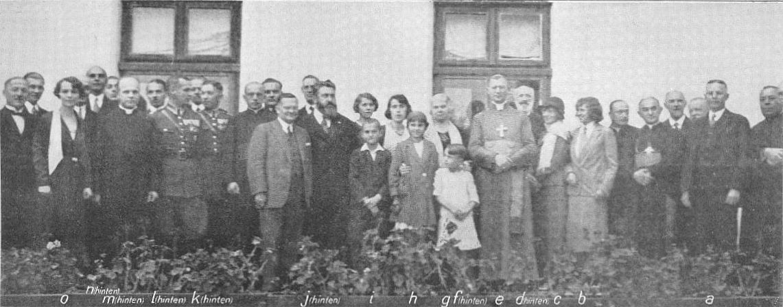 Poświęcenie kościoła Matki Bożej Nieustającej Pomocy w Załużu 11 października 1931. Oznaczeni na zdjęciu: a) Jan Wiktor, b) żona hr. Ireneusza Załuski, c) Helena Gniewosz d) hr. Jan Potocki, e) bp Franciszek Barda, f) Olga Wiktor, g, h, i) Maria, Ewa, Adam Wiktorowie, j) Henryk Mniszek Tchorznicki, k) hr. August Krasicki, l) hr. Ireneusz Załuska, m) bar. Adam Gubrynowicz, n) Paweł Wiktor, o) Maria Wiktor.